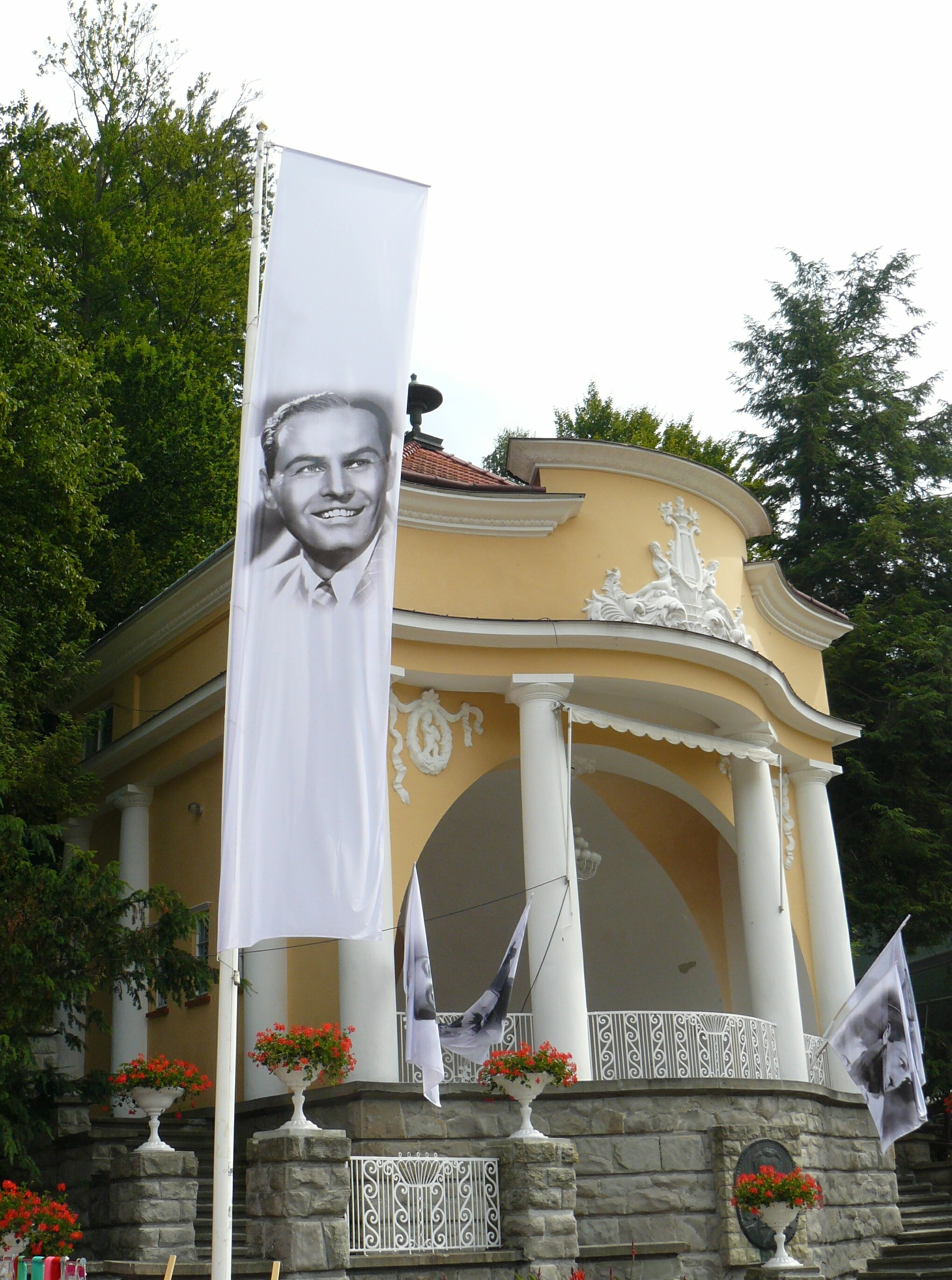 Krynica, muszla koncertowa